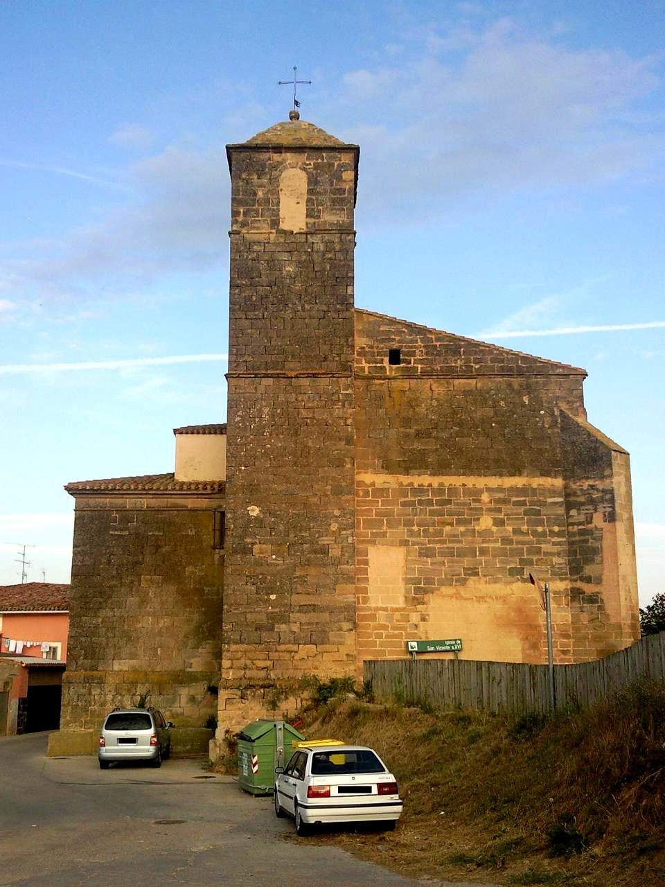 Escudo de Galilea La Rioja España